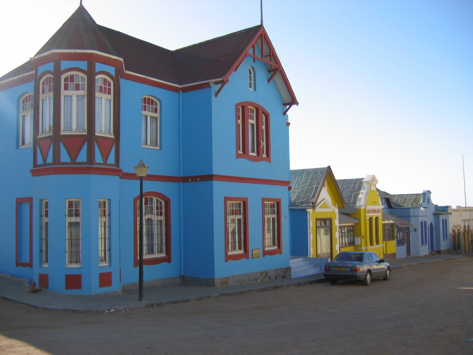 Bergstraße, Lüderitz, Namibia